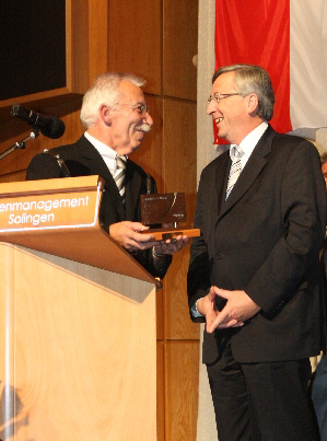 Verleihung der Schärfsten Klinge der Stadt Solingen an den luxemburgischen Premierminister Jean-Claude Juncker